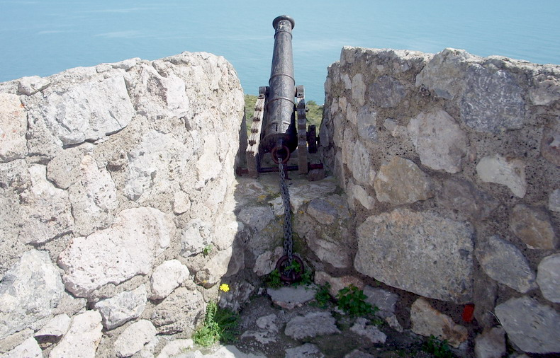 La cannoniera di Forte Filippo a Porto Ercole (GR)